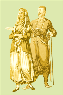 Grbaljski knez i knjeginja, iz 1804.godine (po ilustracijama iz putopisne knjige Wiliama Millera)